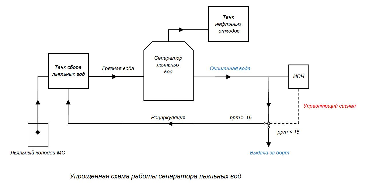 Упрощенная схема сепарации льяльных вод